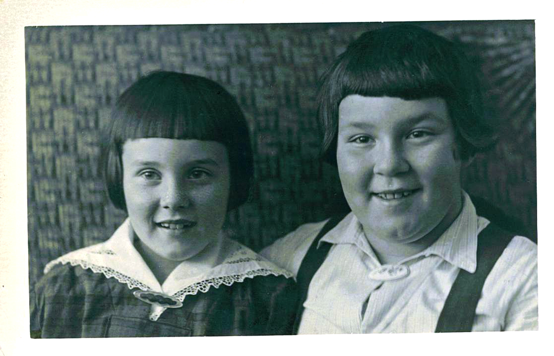 Світлана Мартинова та Михайлина Коцюбинська, 1939 рік: Майбутня театральна акторка Світлана Мартинова (зліва) та племінниця українського письменника Михайла Коцюбинського Михайлина Коцюбинська, 1939 рік